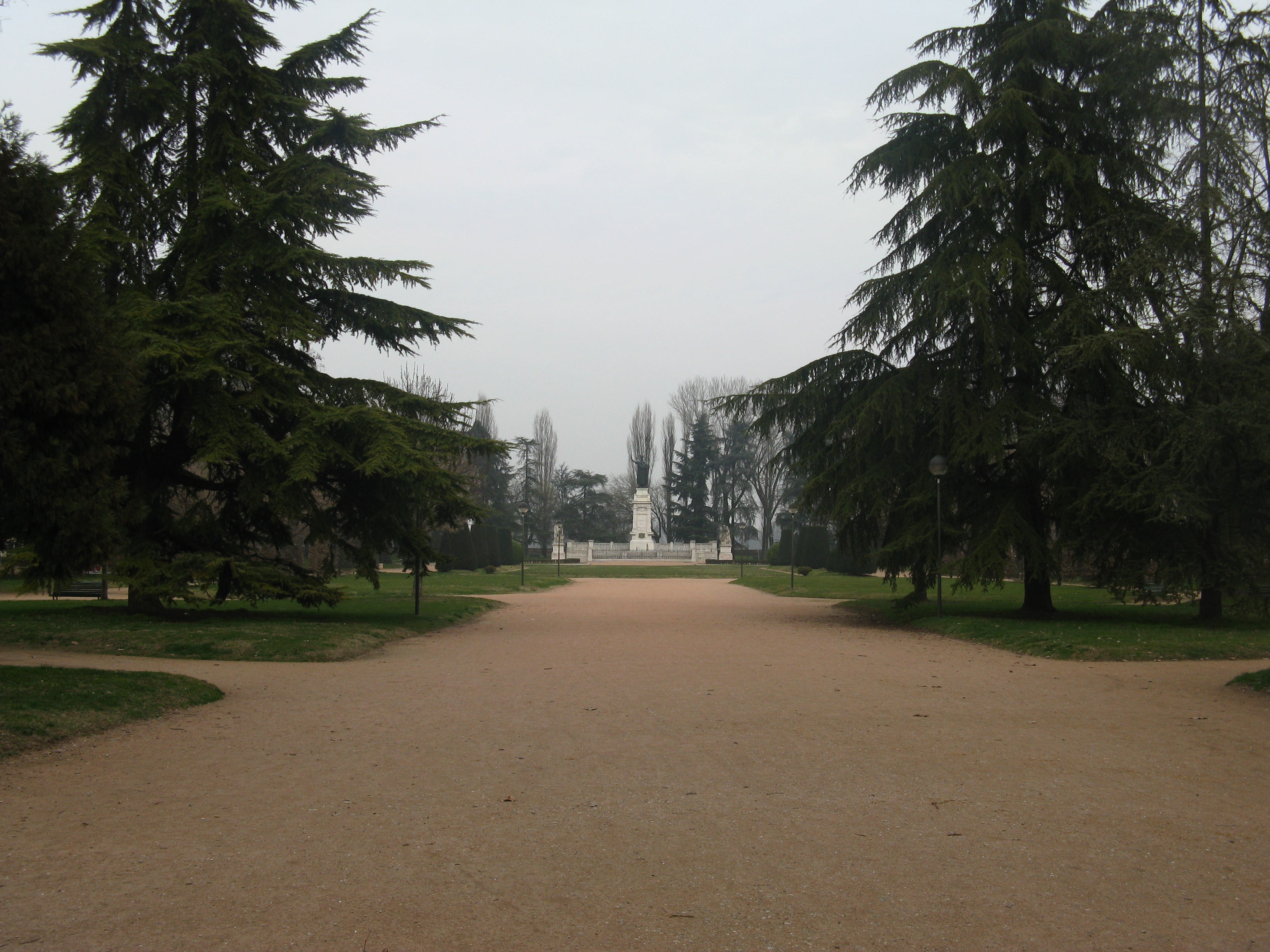 Piazza Virgiliana a Mantova